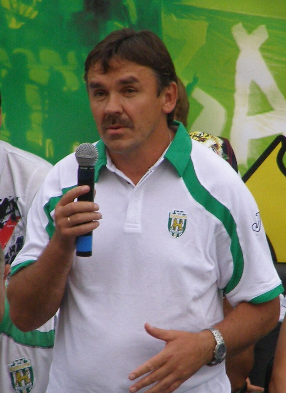 Ukrainischer Fußballtrainer Wolodymyk Besubjak während der Karpaty-Team Präsentation vor der Saison 2010/11